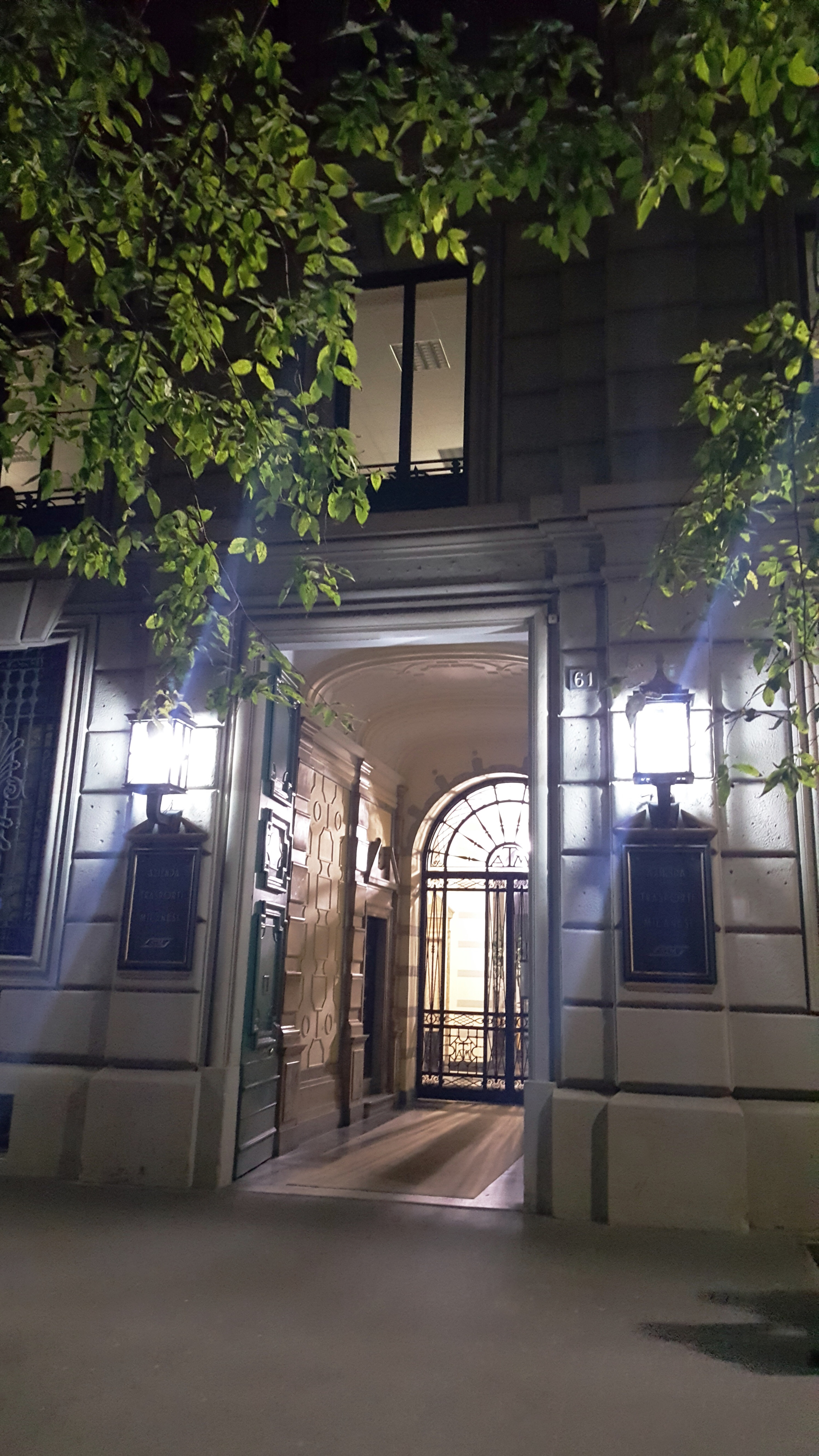 Sede ATM a Milano, Foro Buonaparte, 61